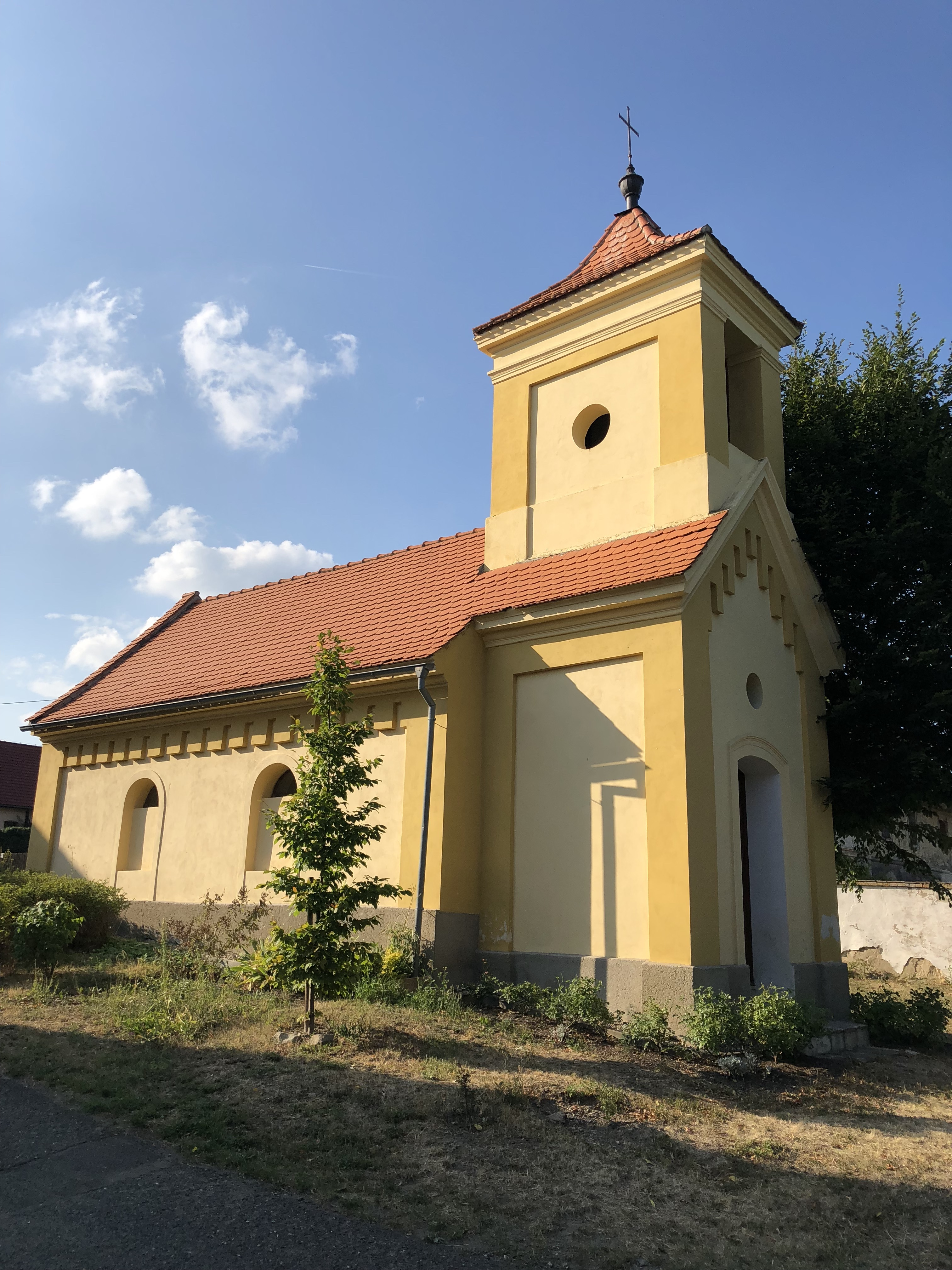 Kaple v Trnobranech z boku